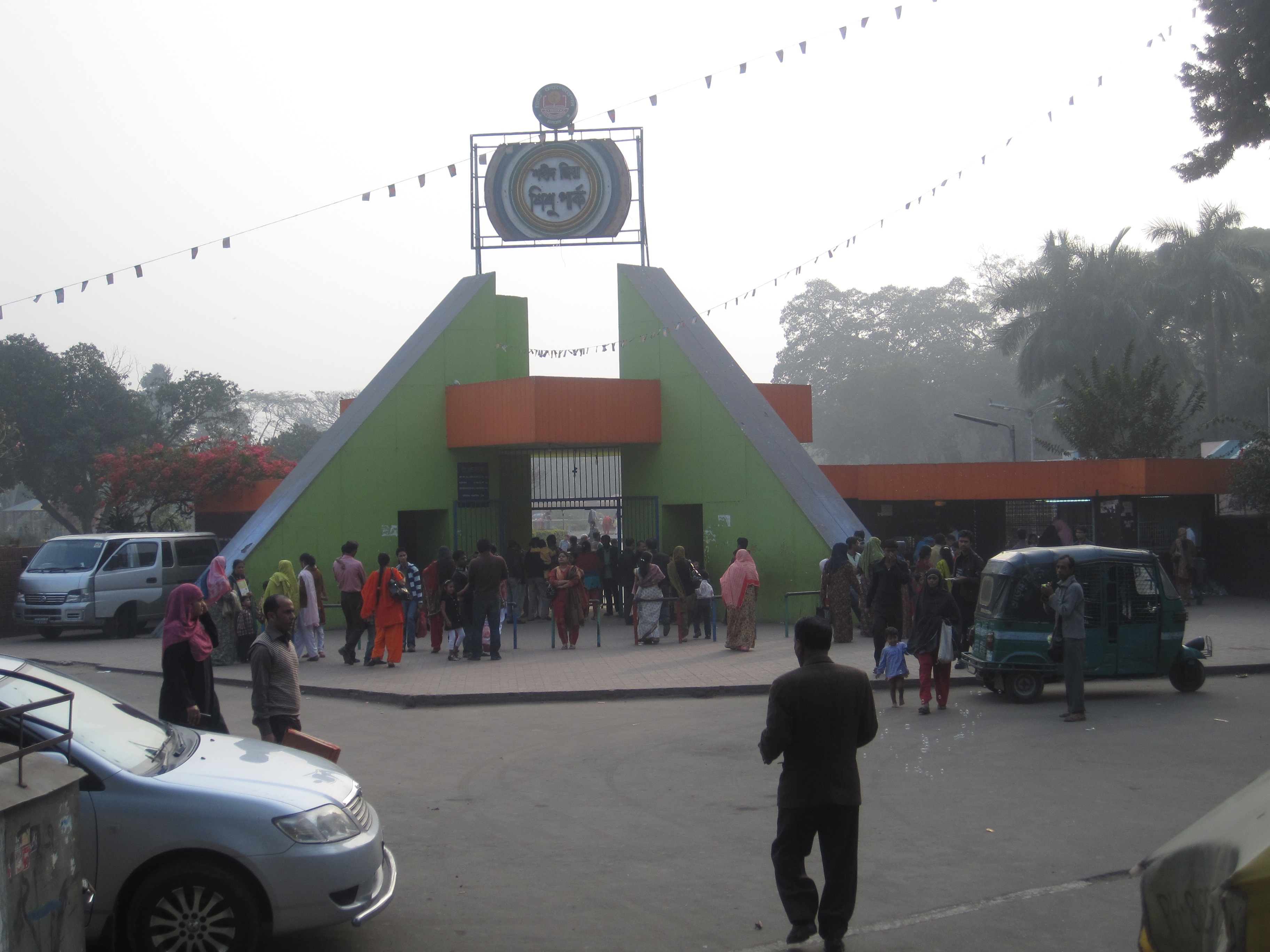 Dhaka Sishu Park